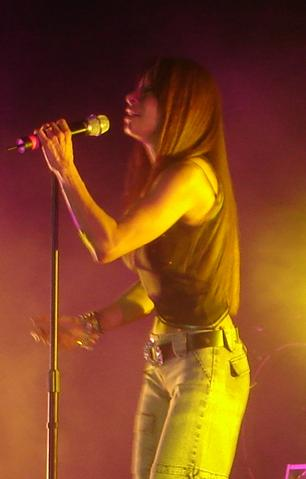 Ivonne guevara (Flans)